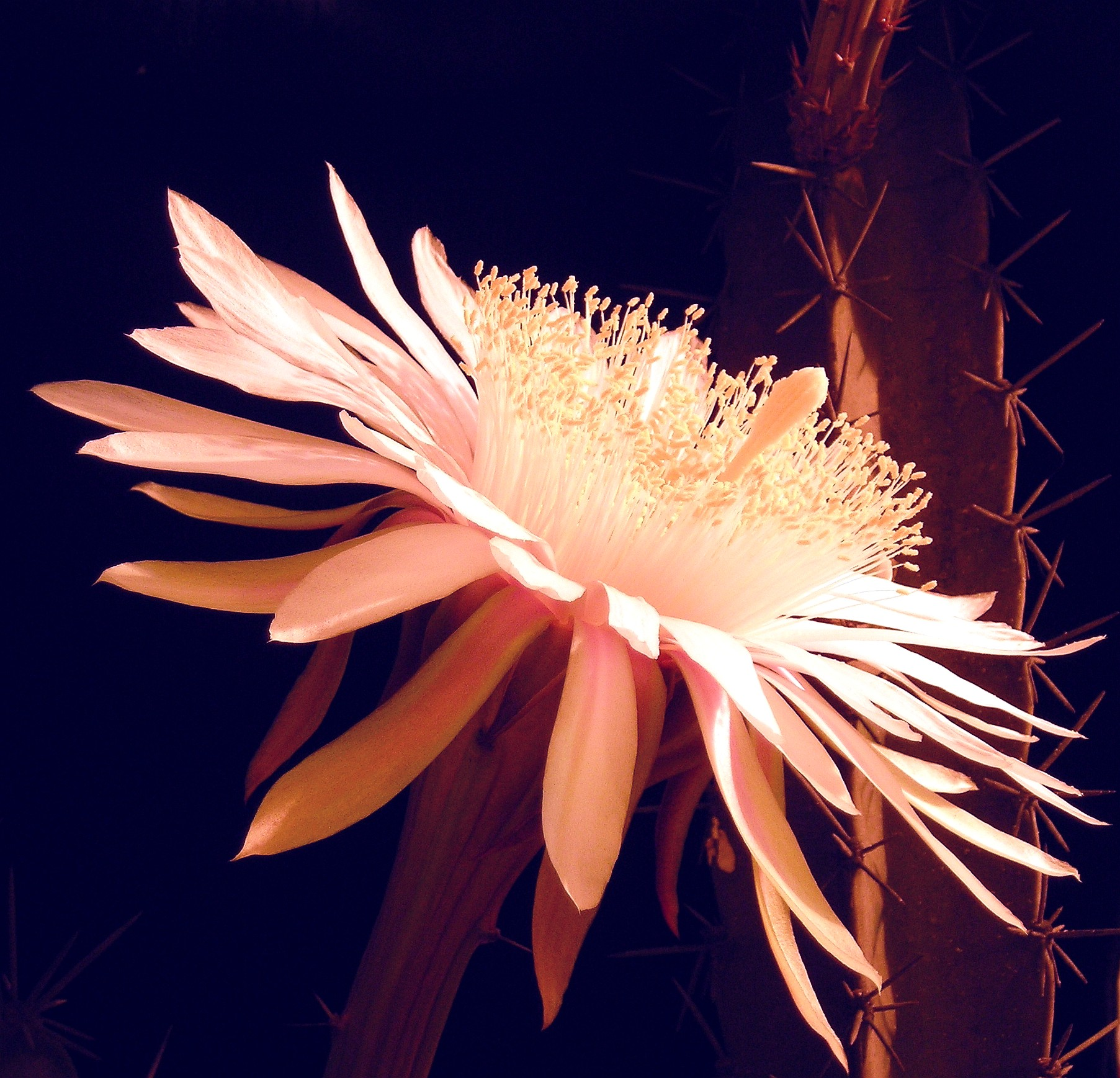 Flor de Acanthocereus tetragonus (CACTACEAE) Península de Azuero - Panamá